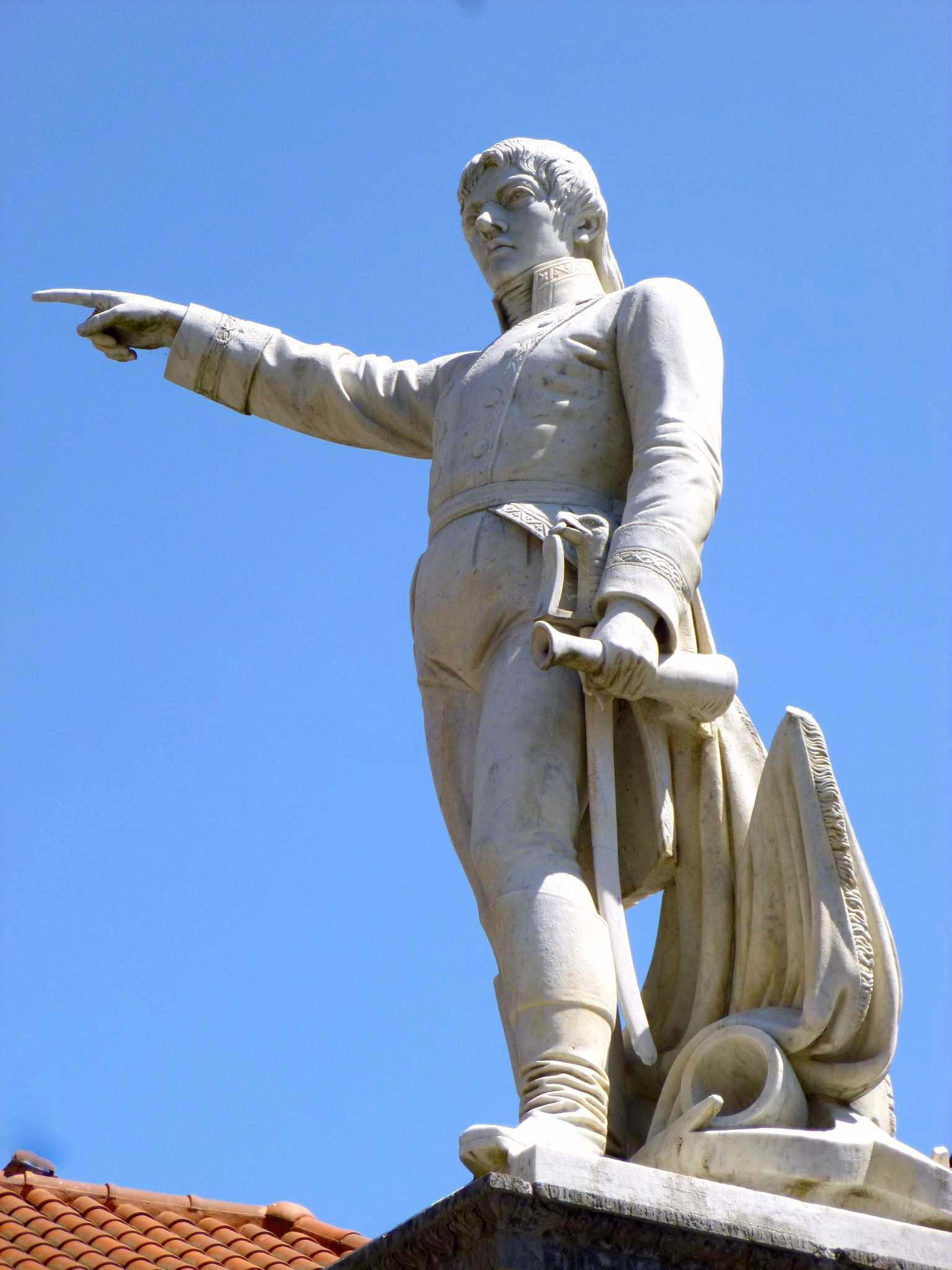 Monumento a Cosme Damián Churruca (Mutriku, Gipuzkoa)